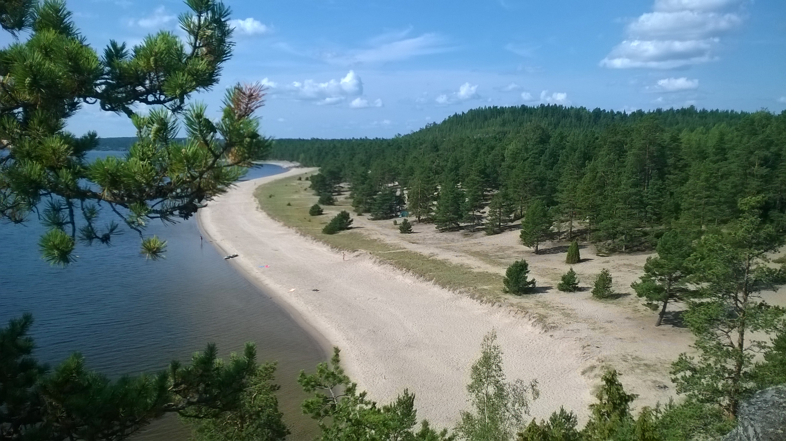 Пляж острова Кайонсари